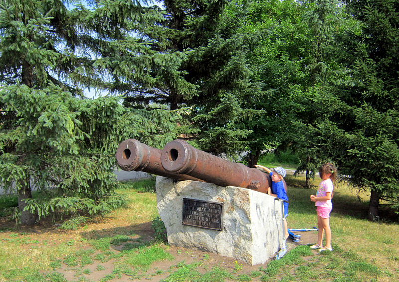 Бийск. Пушки Бийской крепости.